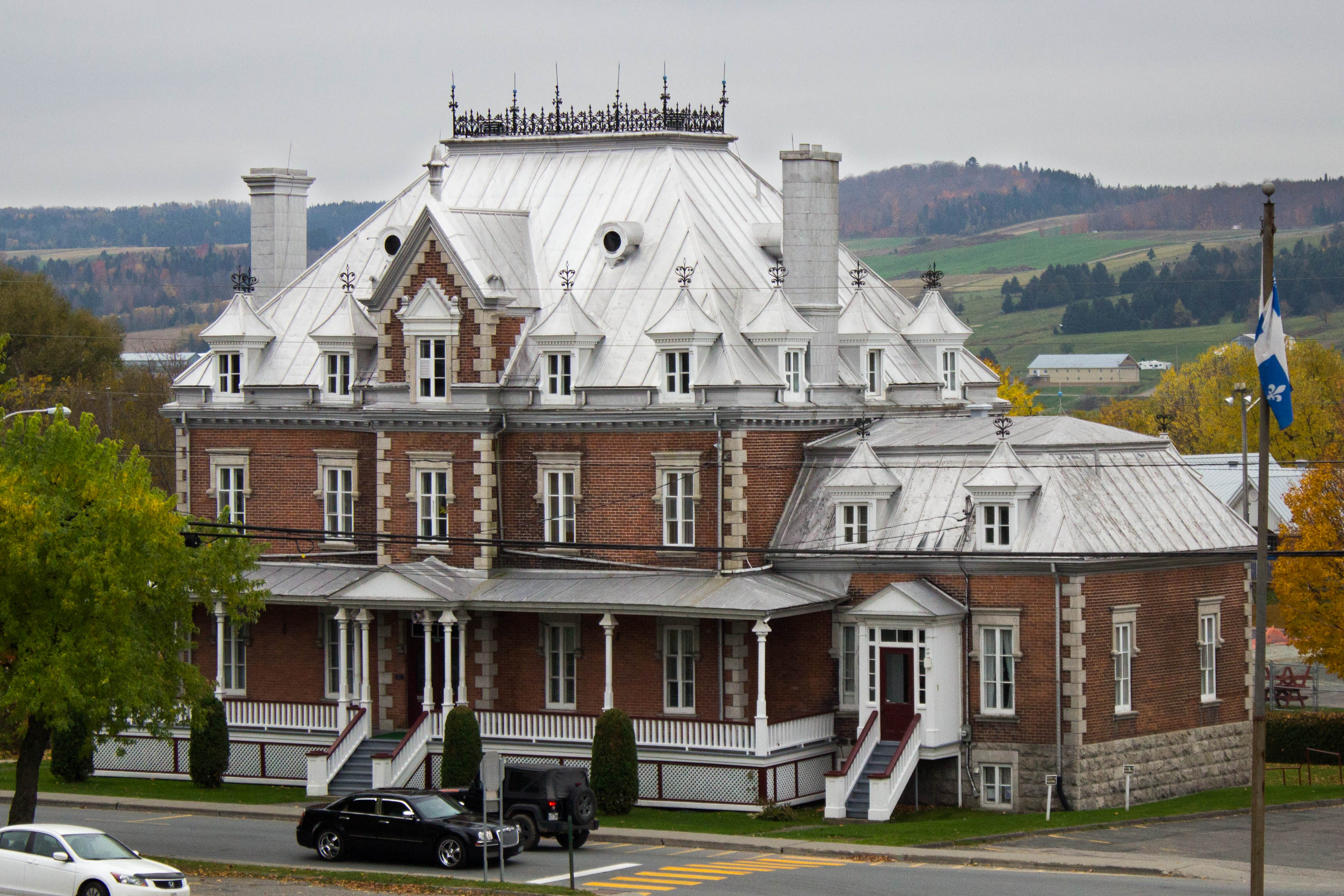 Presbytère de l'ensemble institutionnel de Saint-Joseph-de-Beauce